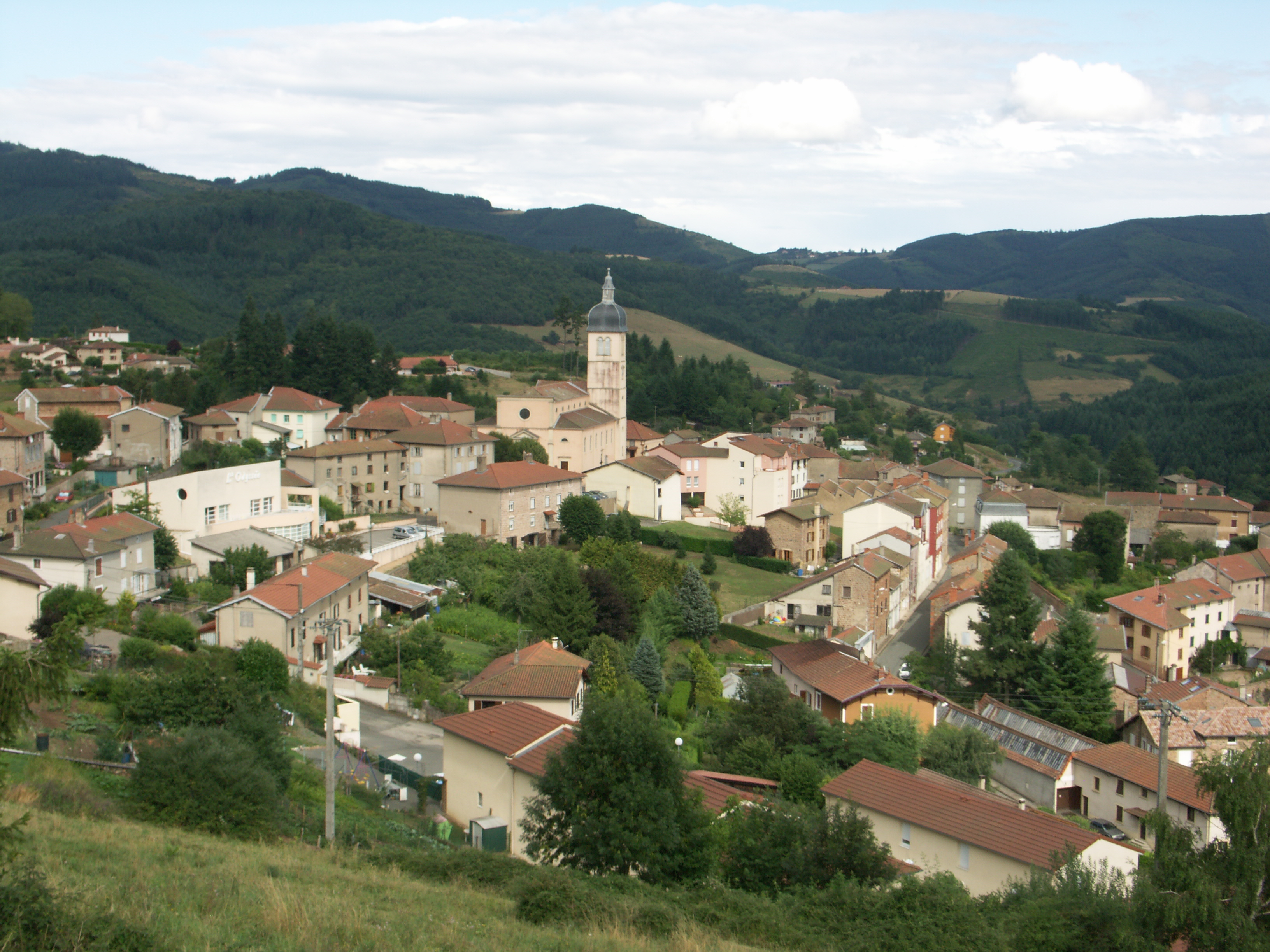 Vue du village de Grandris, dans le département du Rhône